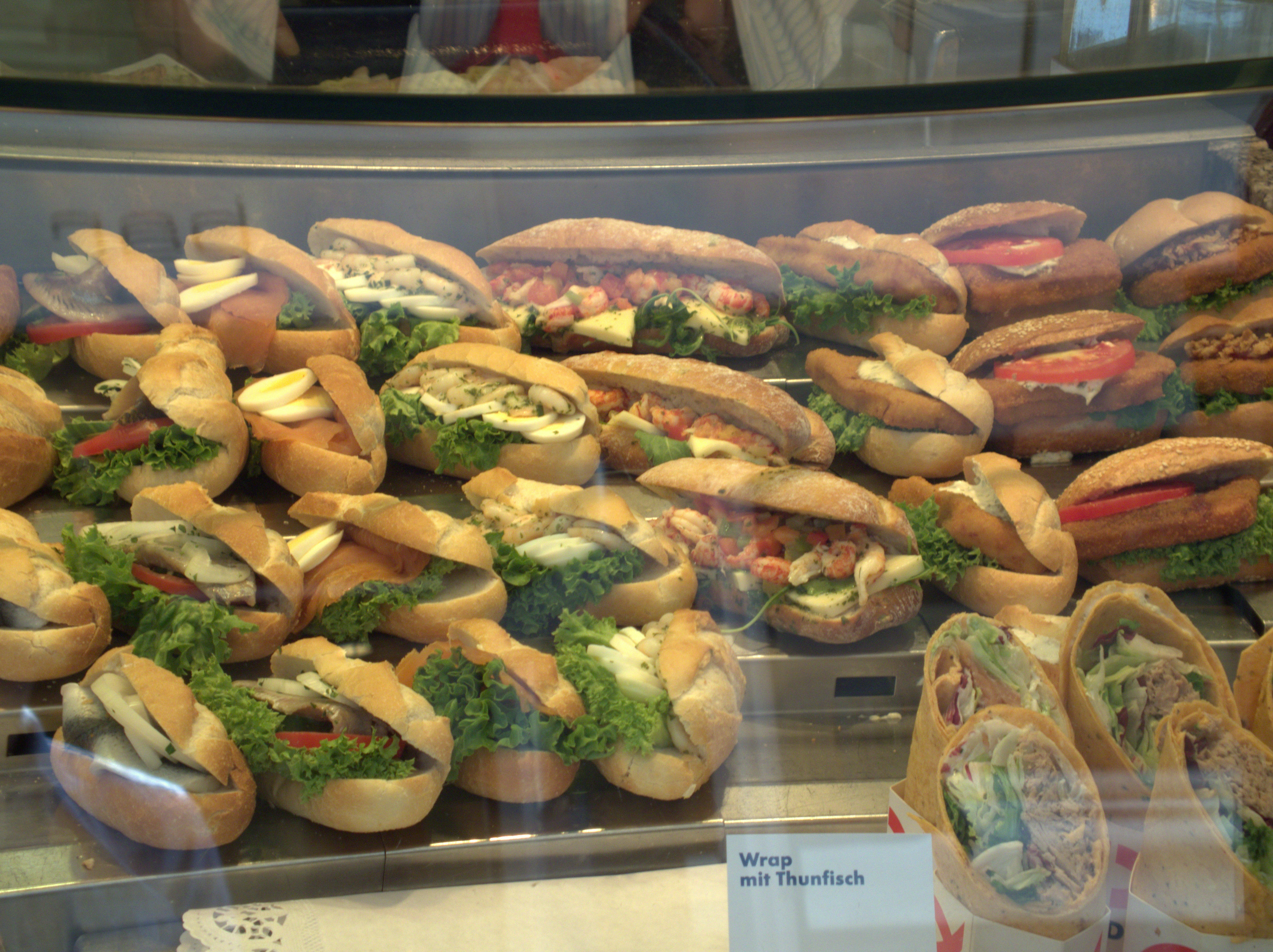 Der Naschmarkt zu Wien